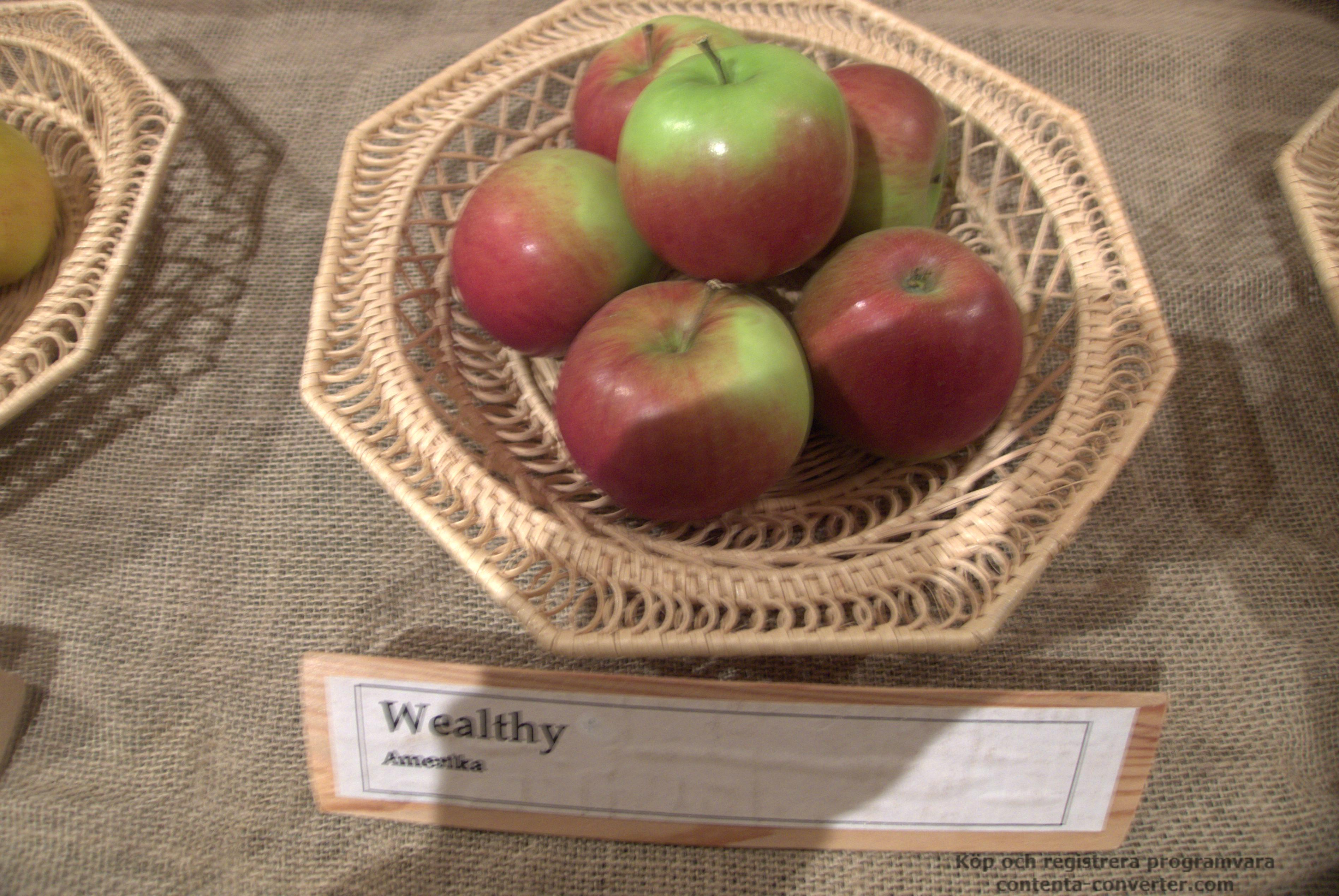 Äpplen av sorten Wealthy